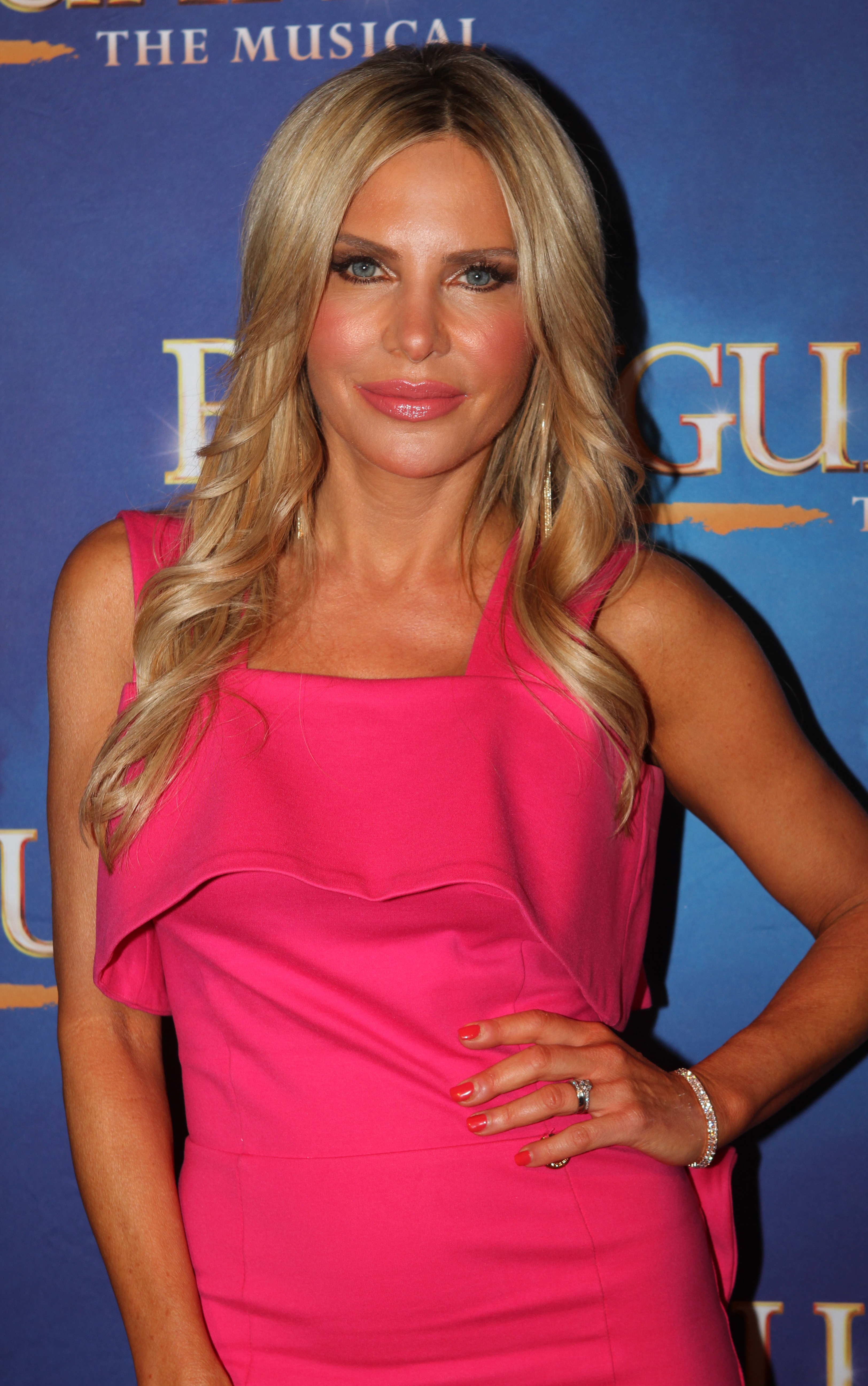 Melissa Tkautz à la première de The Bodyguard the Musical à Sydney.